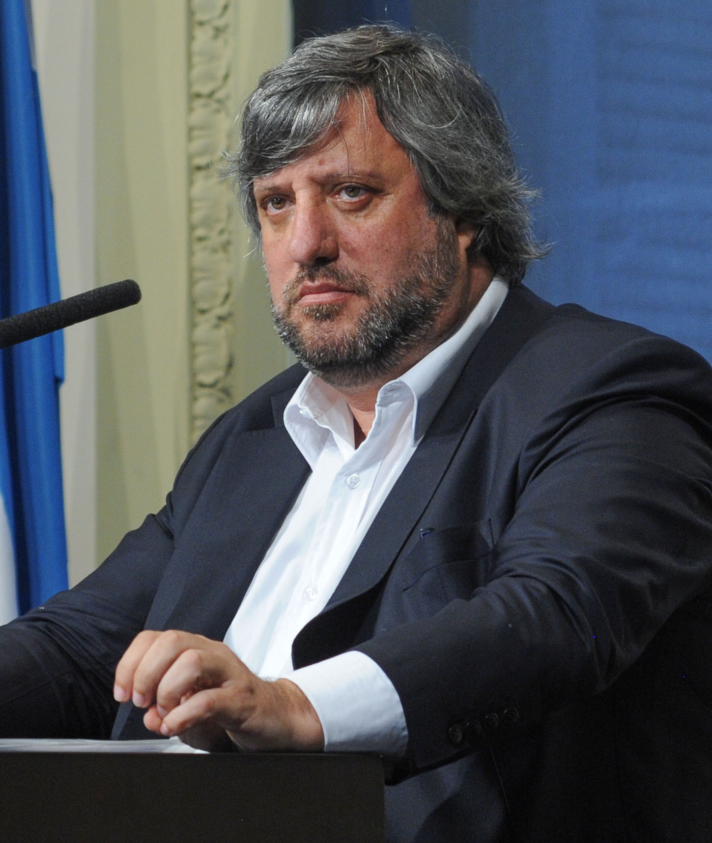 El Jefe de Gabinete, Marcos Peña, anunció en conferencia de prensa la creación del Ente Nacional de Comunicaciones (ENACOM), que estará a cargo de Miguel de Godoy. El nuevo organismo unificará las funciones de la Autoridad Federal de Servicios de Comunicación Audiovisual (AFSCA) y la Autoridad Federal de Tecnologías de la Información y la Comunicación (AFTIC). Además, el funcionario anunció la creación de una Comisión Bicameral para el análisis, el debate y la redacción de una nueva Ley de Comunicaciones.